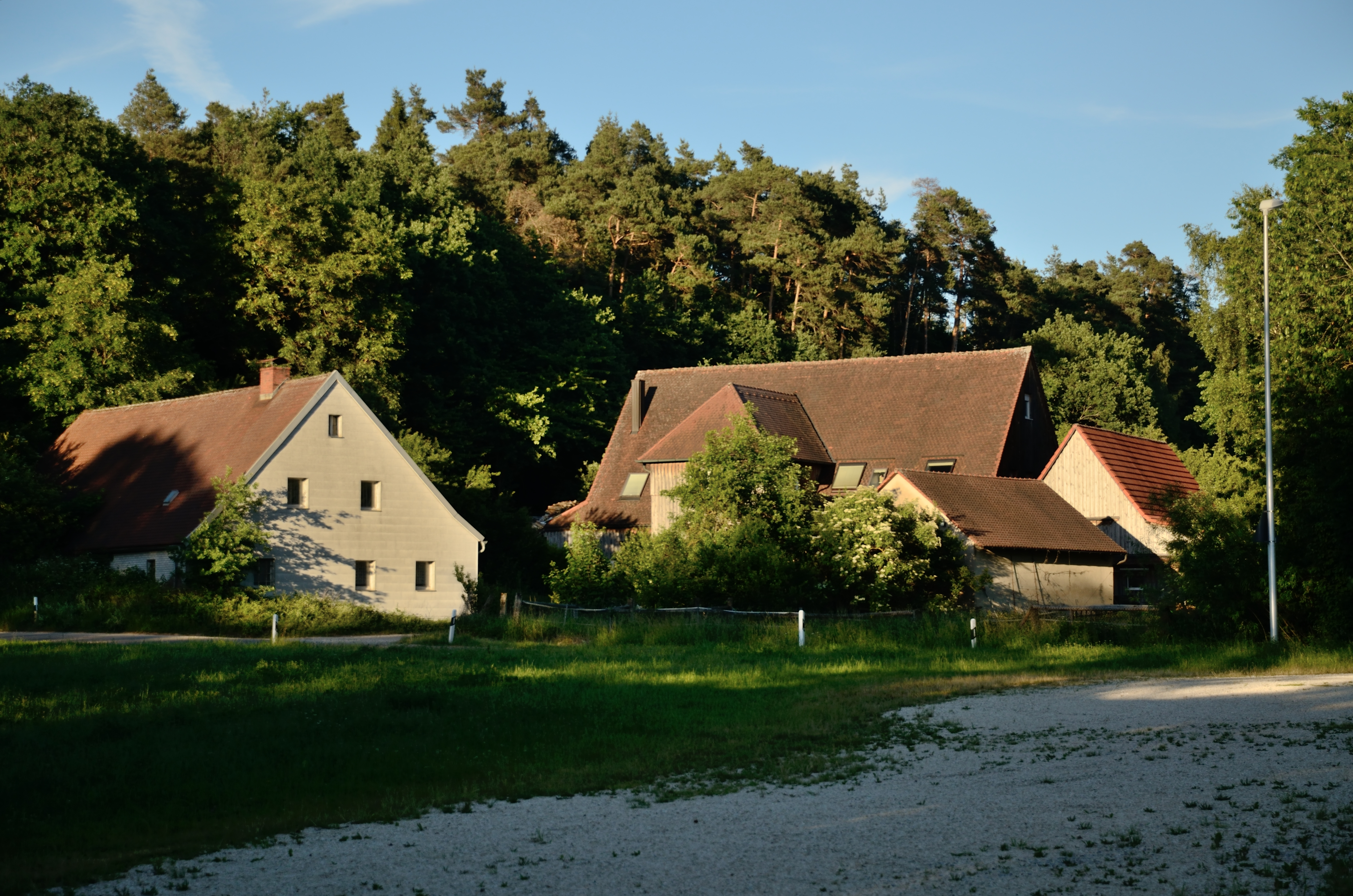 Wolfartswinden